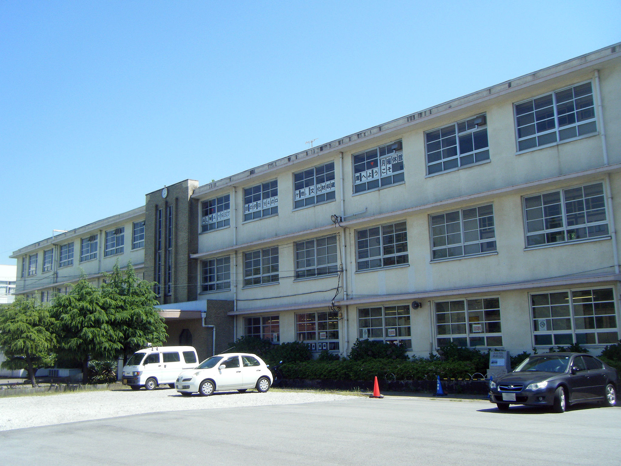 尼崎市文化財収蔵庫 本館北側外観